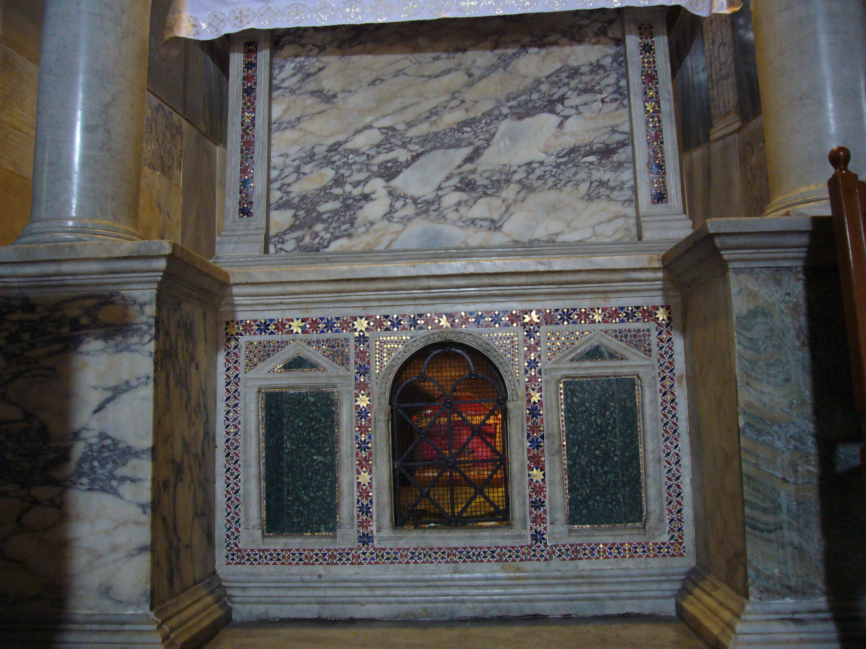 Roma, San Giorgio in Velabro: decorazione cosmatesca del ciborio